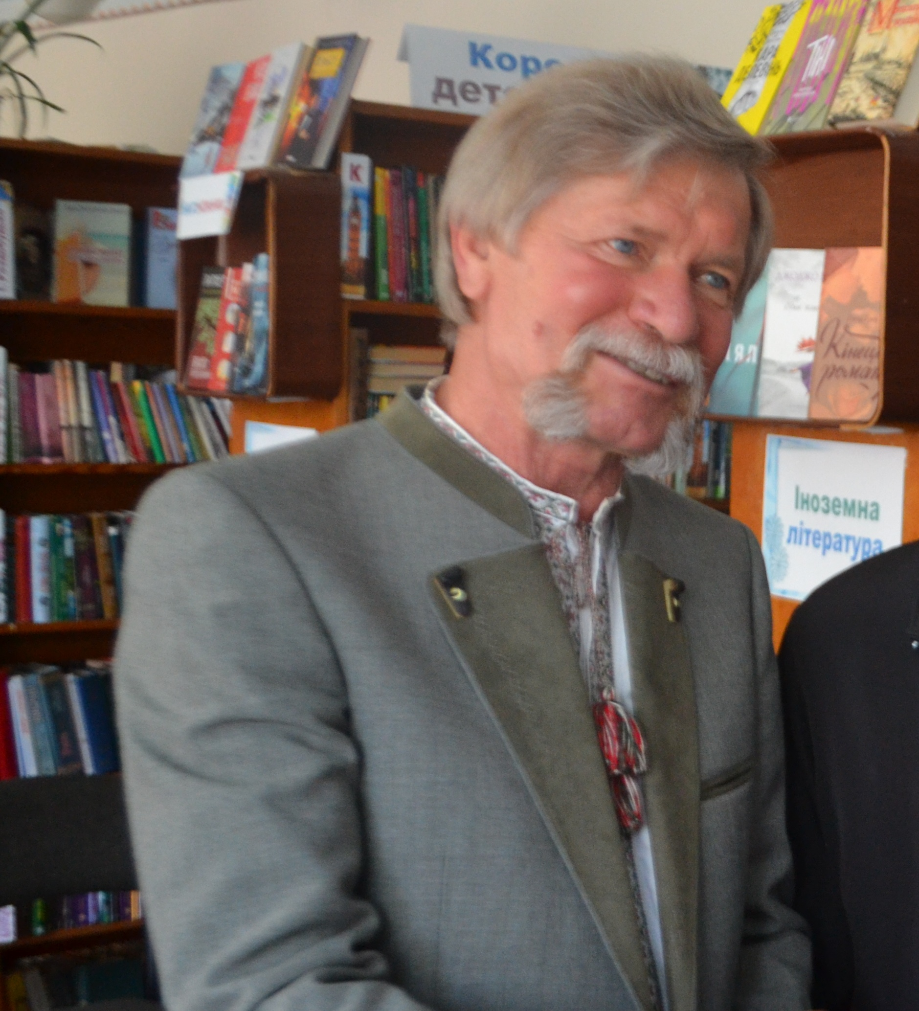 Письменник Степан Шкапій